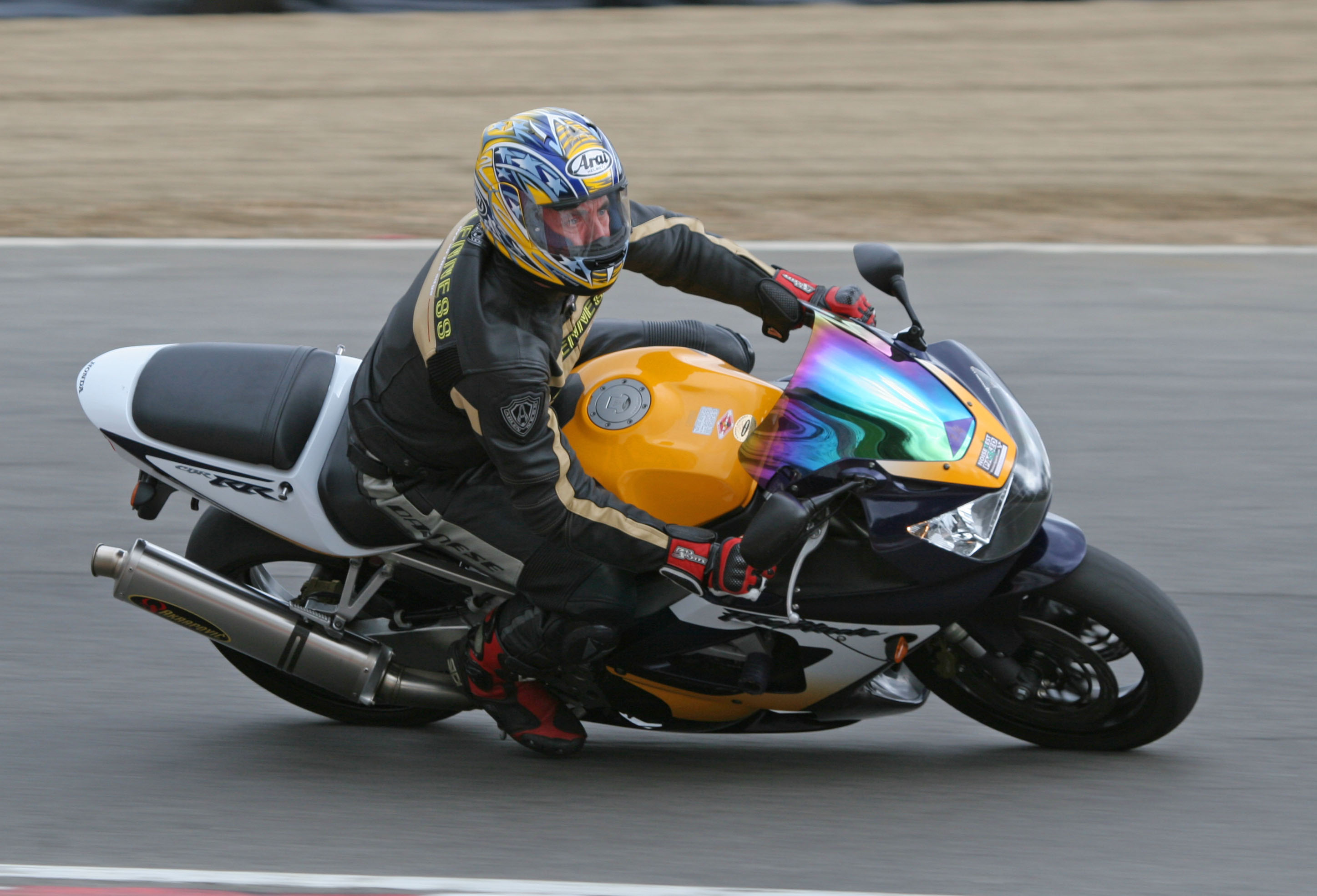 Honda CBR RR Fireblade